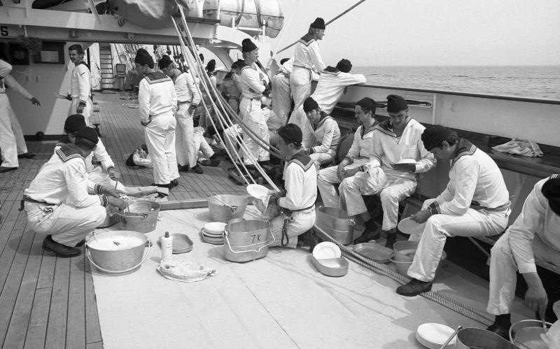 Das Segelschulschiff der Bundesmarine "Gorch Fock" verlässt zur 48/49 Auslandsausbildung den Kieler Hafen